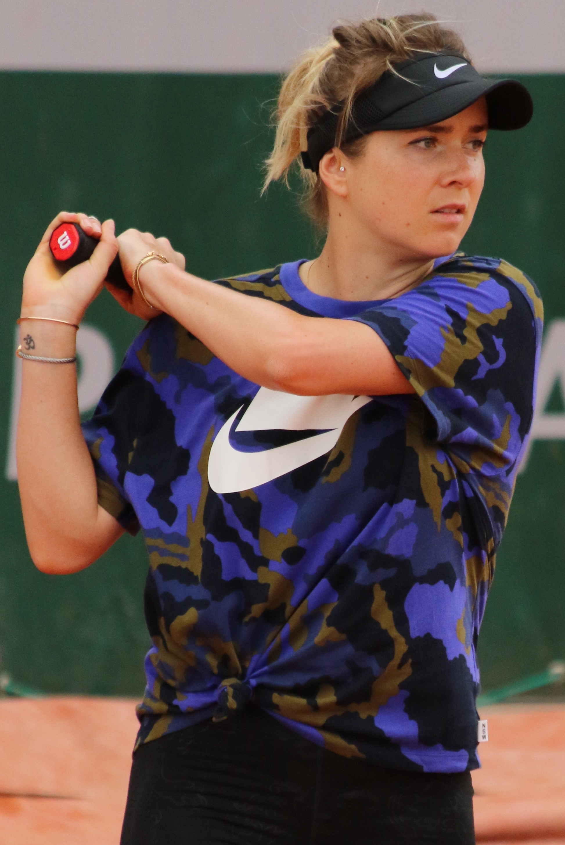 Svitolina RG19 (16)